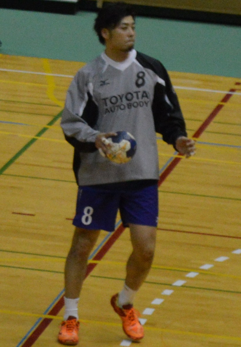 日本ハンドボールリーグ2015-16 トヨタ車体ブレイブキングス、藤田聖史